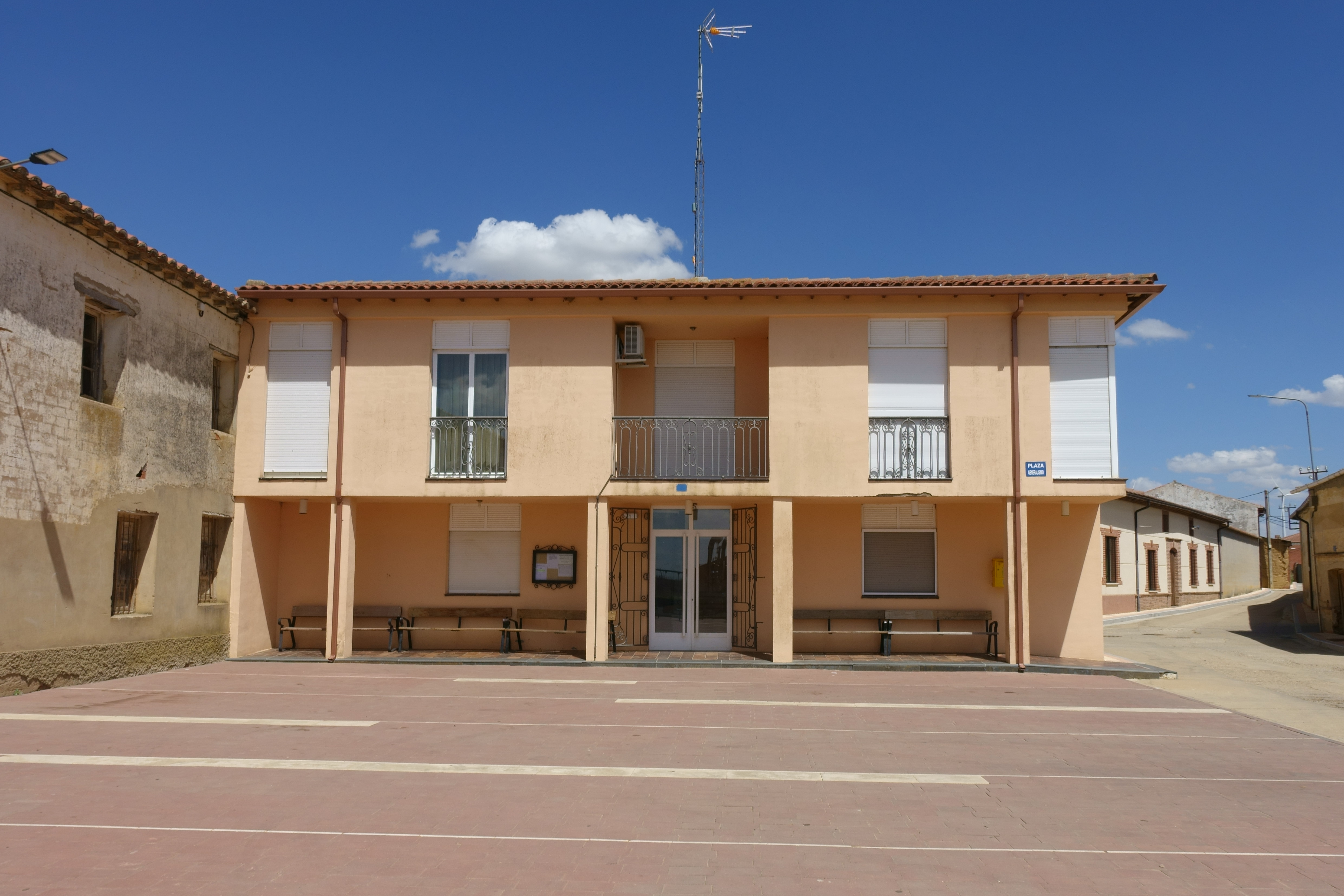 Casa consistorial de Villanueva del Rebollar (Palencia, España).